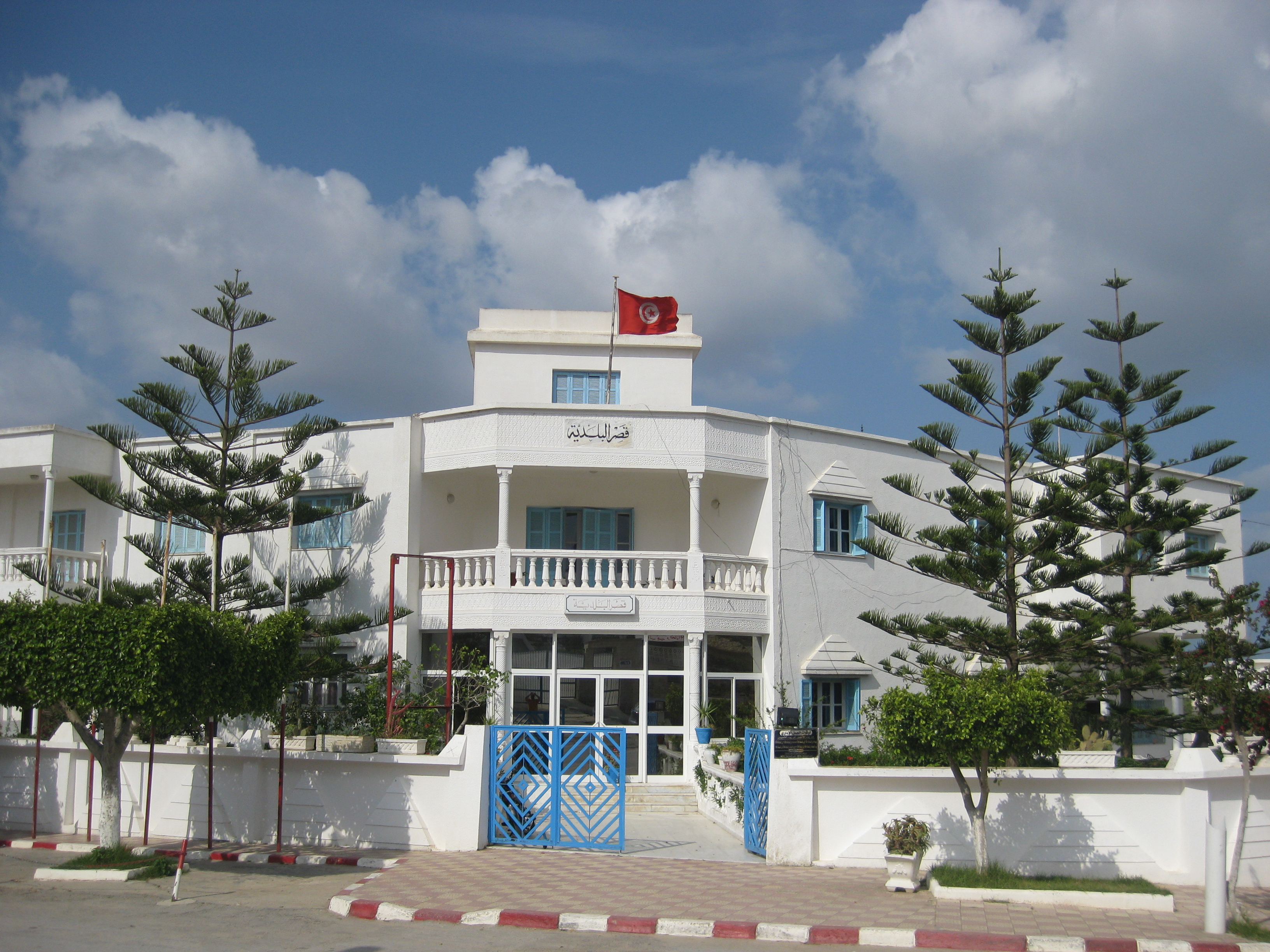 Mairie de Somâa